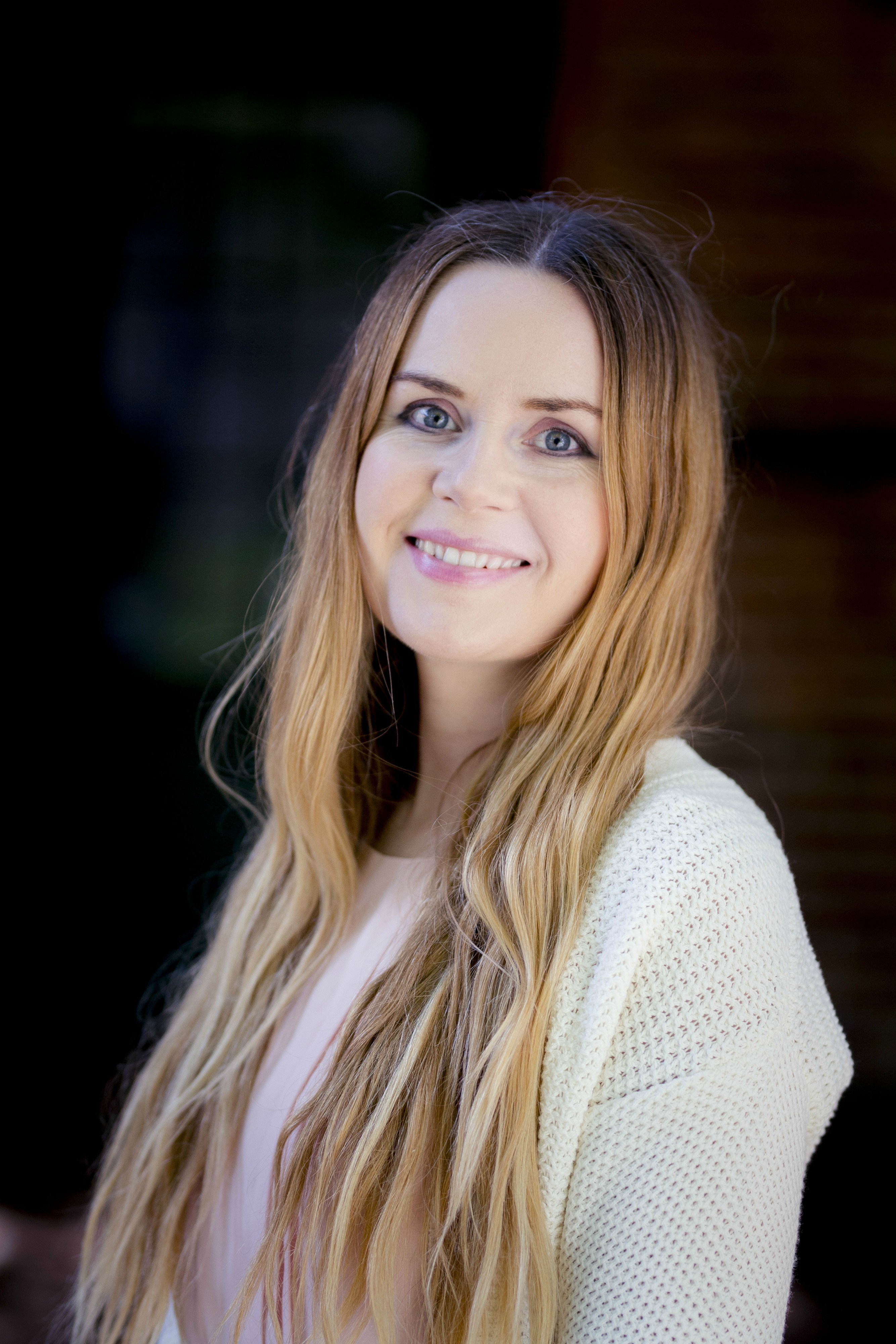 Daglig leder i Minotenk, Linda Noor